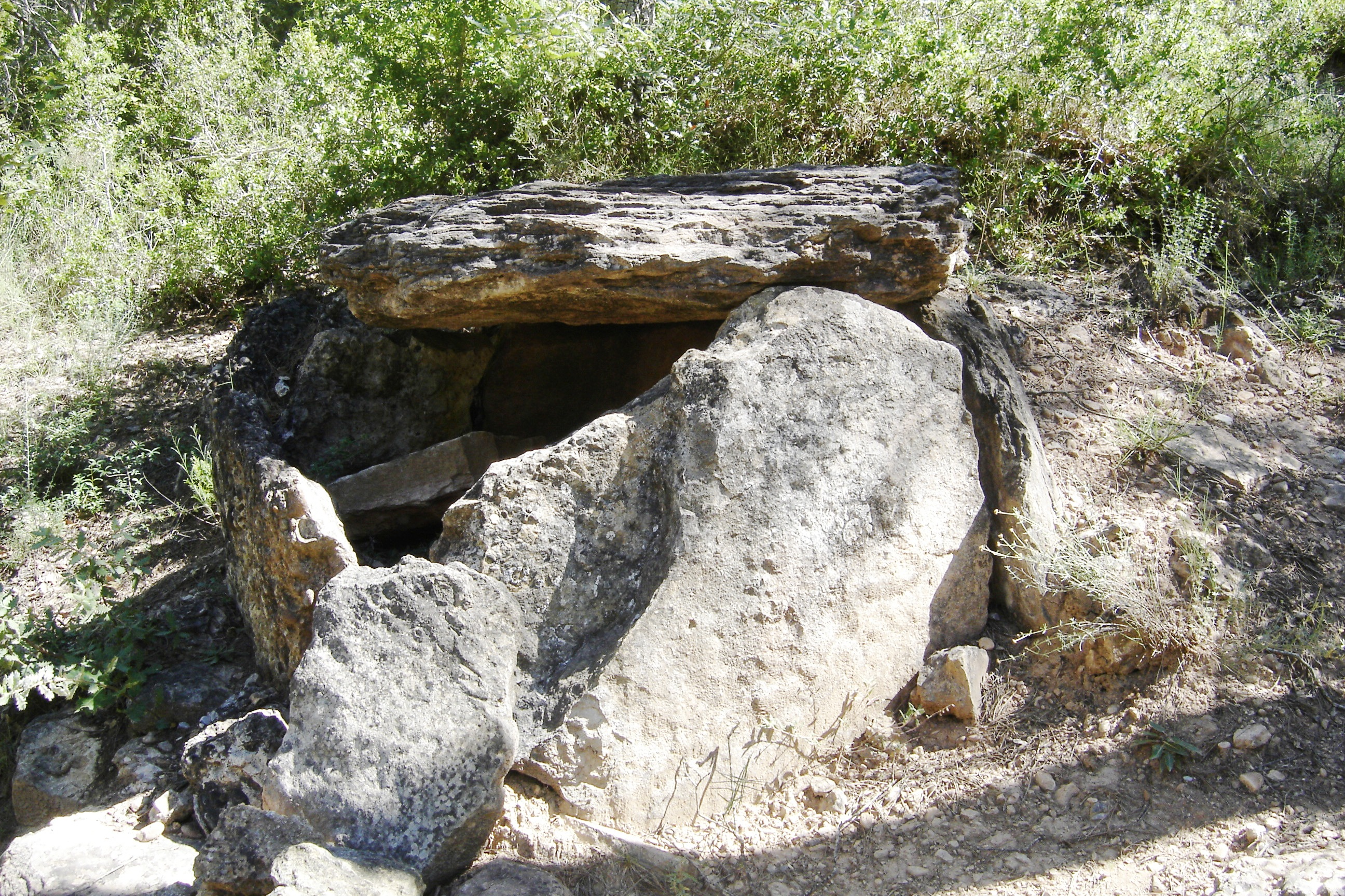 La denominada TOMBA 3 de la Necrópolis de Ceuró (Castellar de la Ribera, Solsonès)